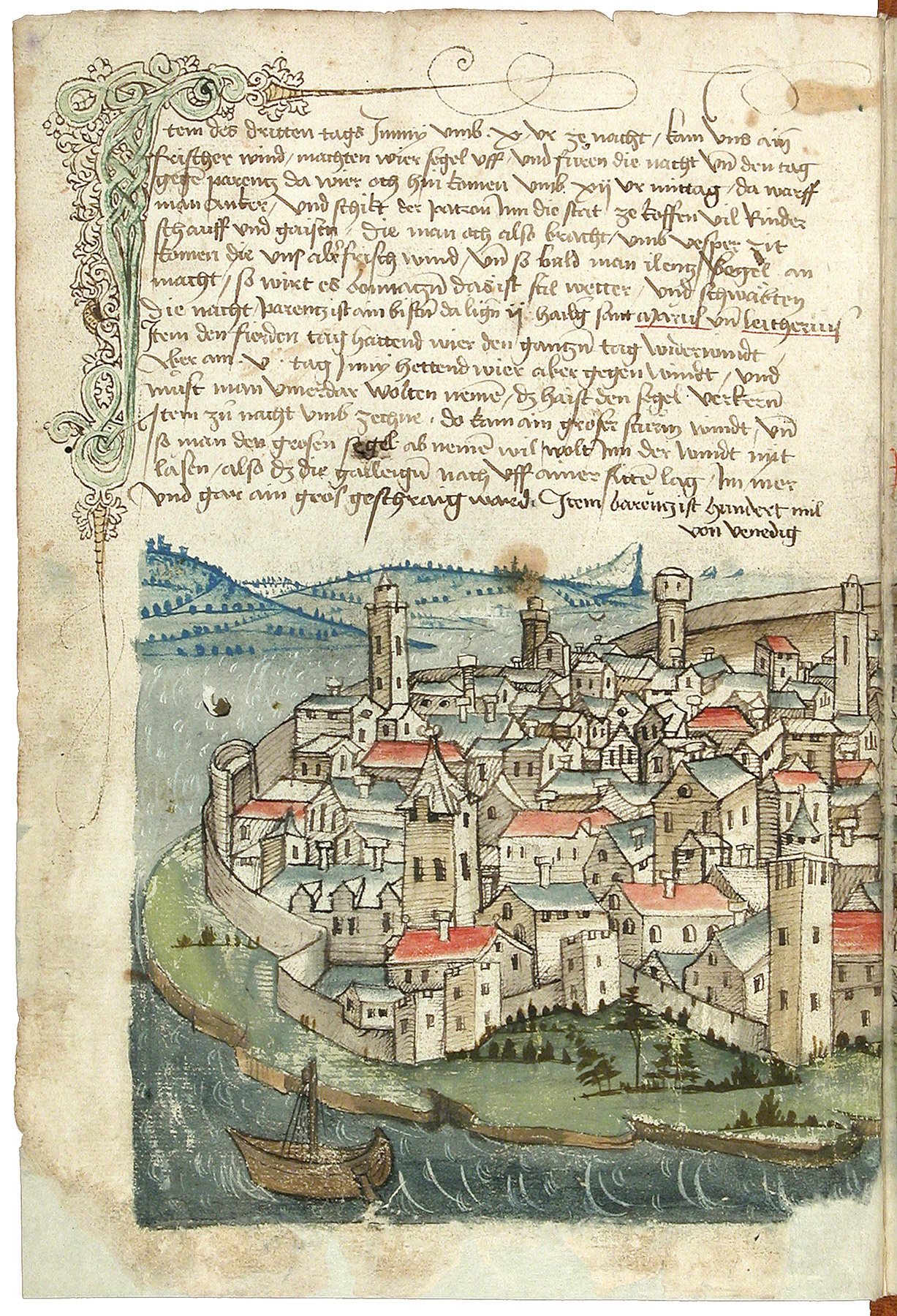 Schilderung einer Pilgerreise von Konstanz nach Jerusalem durch Konrad von Grünenberg, um 1487 Konrad von Grünenberg: Beschreibung der Reise von Konstanz nach Jerusalem - Cod. St. Peter, pap. 32. Handschrift, Bodenseegebiet (Konstanz?), um 1487. II + 53 Blätter, 32x21, mit 31 kolorierten Zeichnungen der Reiseroute von Venedig bis Palästina. Text in alemannischer Mundart.